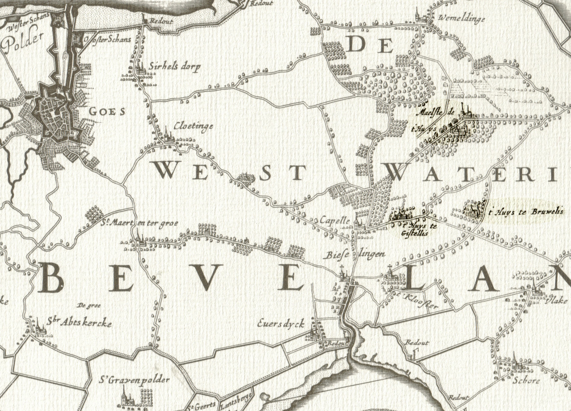 Detail van de 9 delige wandkaart van Zeeland waarop de kastelen ten oosten van Kapelle uitgelicht zijn.